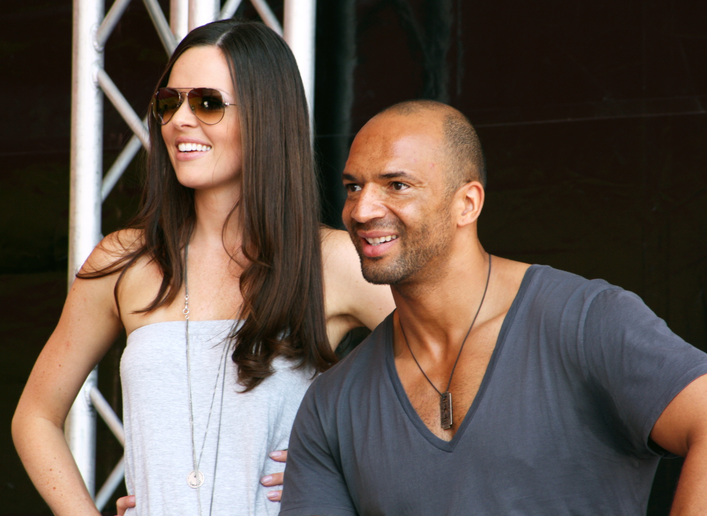 Kate Hall und Detlev D! Soost auf der Theresienwiese in München beim REWE Fest Happy Family